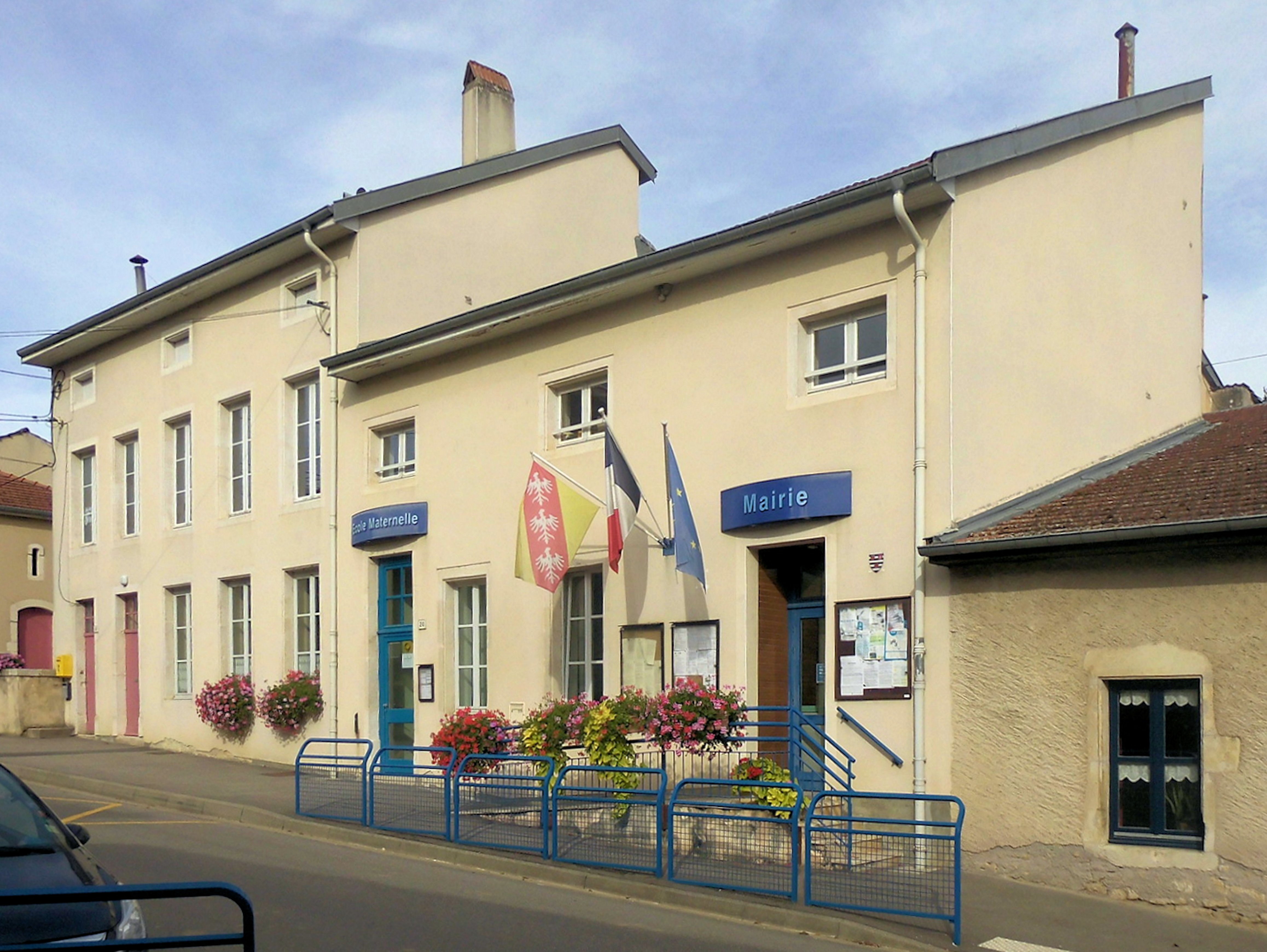 La mairie et l'école maternelle de Favières